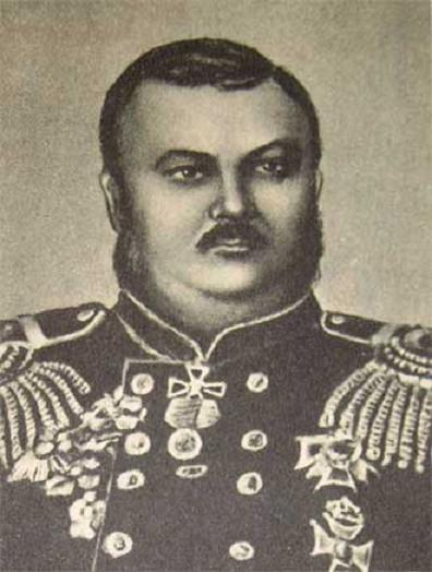 Портрет